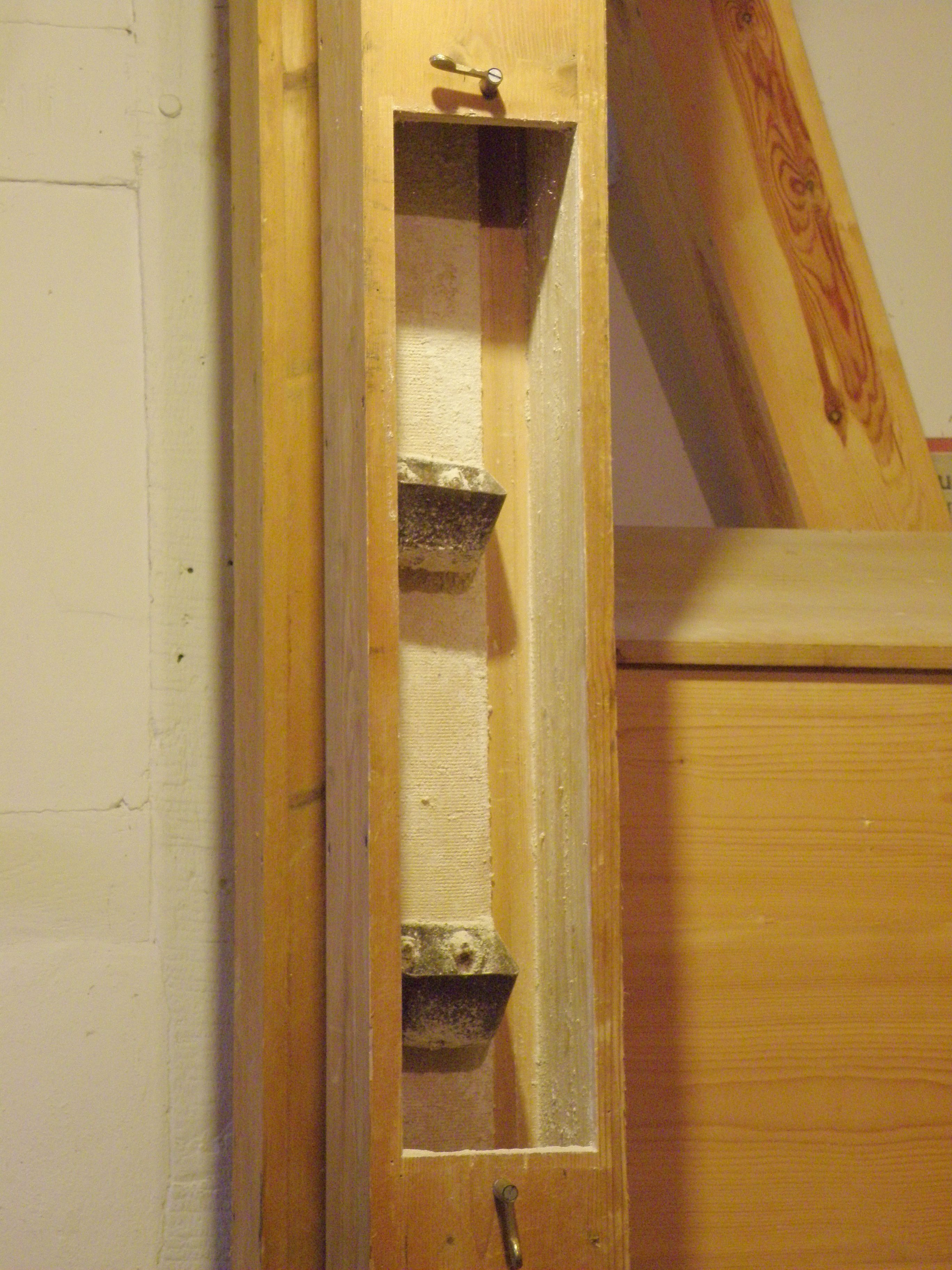 Teil des Becherlaufwerks in einem Sichtfenster